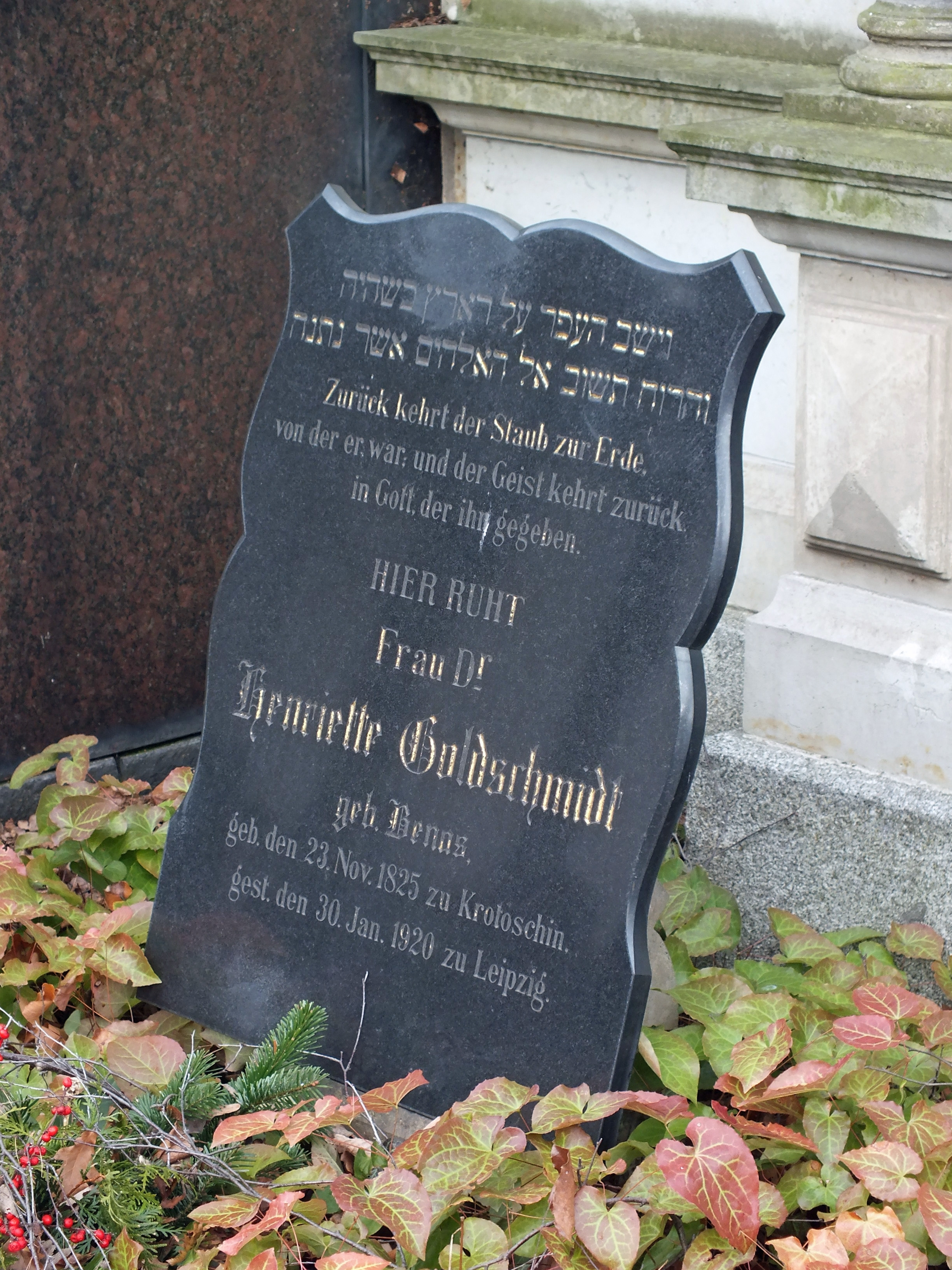 Alter Israelitischer Friedhof in Leipzig. Grabtafel der Henriette Goldschmidt.